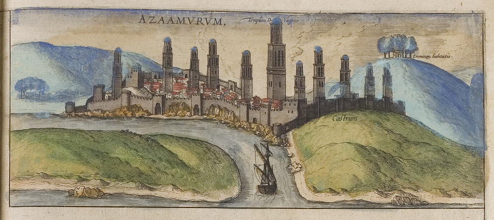 Azemmour